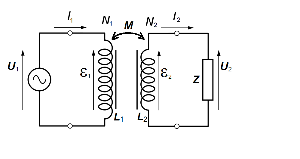 A hypothetical ideal transformer considered as a circuit element, consisting of N1 turns in the primary winding, and N2 in the secondary. Electrical power supplied to the primary circuit is delivered to the load in secondary circuit by means of mutual induction. The time-varying magnetic flux in the core generates an electromagnetic force over each of the windings. Original work made by user "Me"